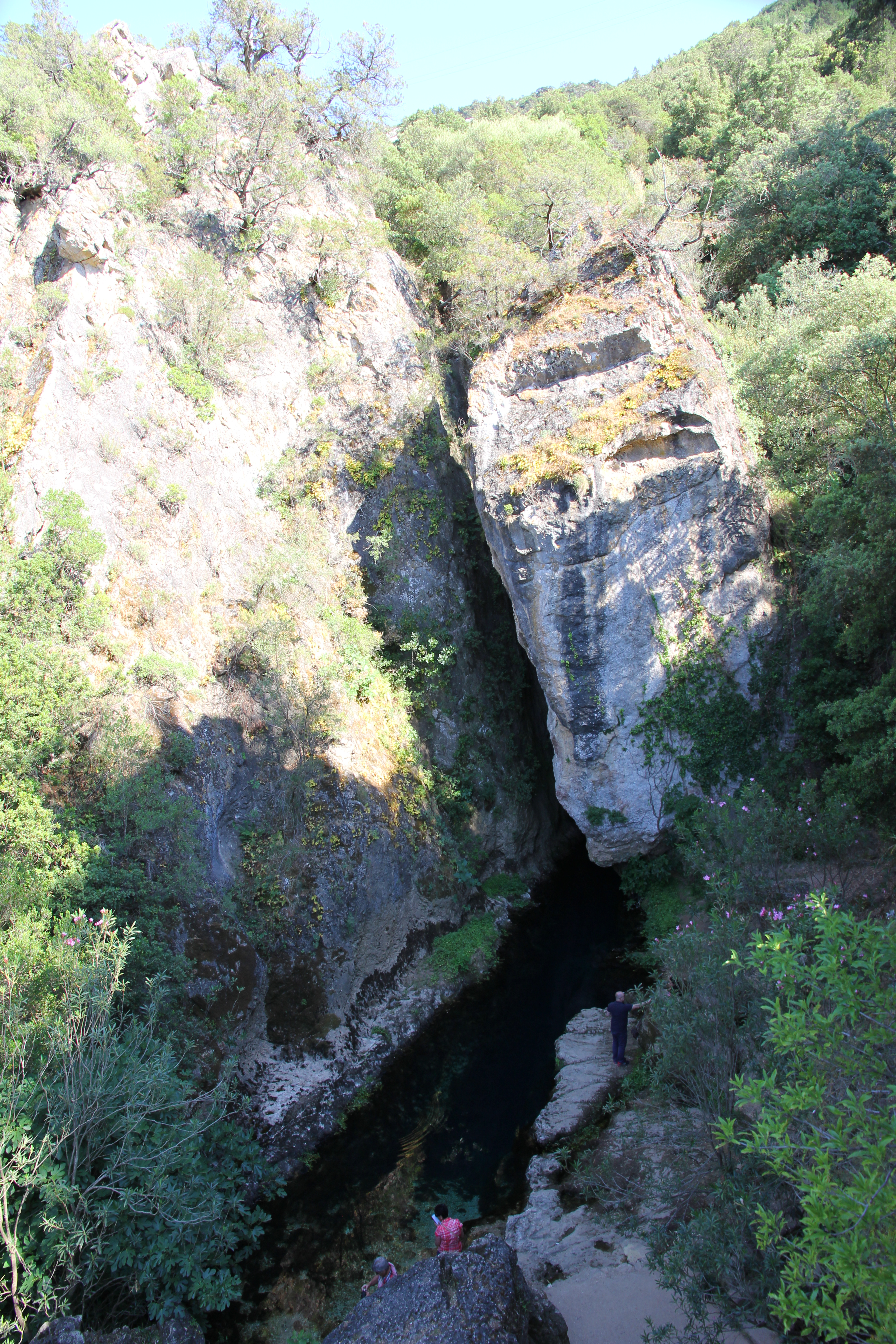 Oliena - Su Gologone